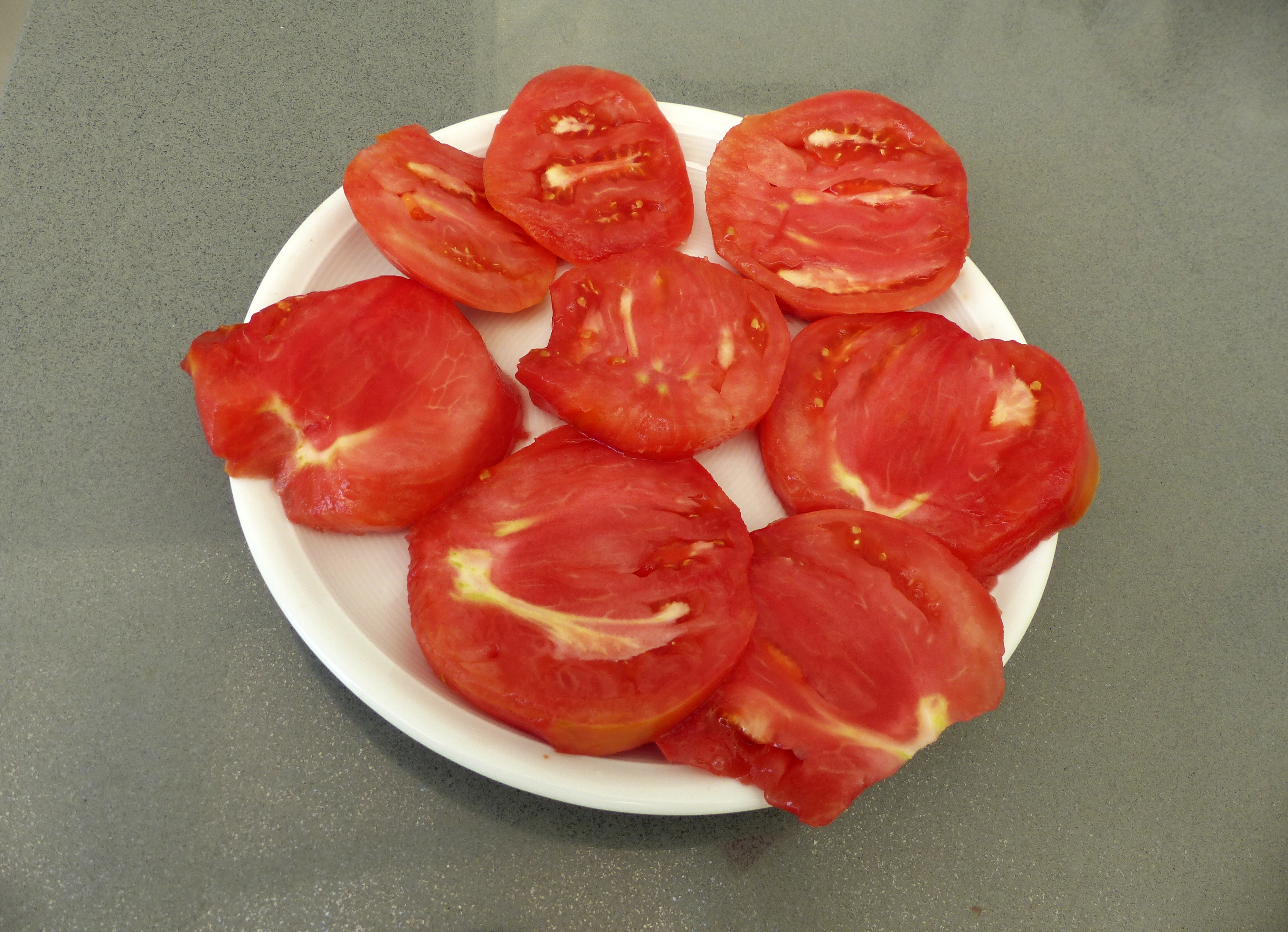 Son tomates macizos, sonrosados, con pocas semillas, piel fina y exquisito sabor.